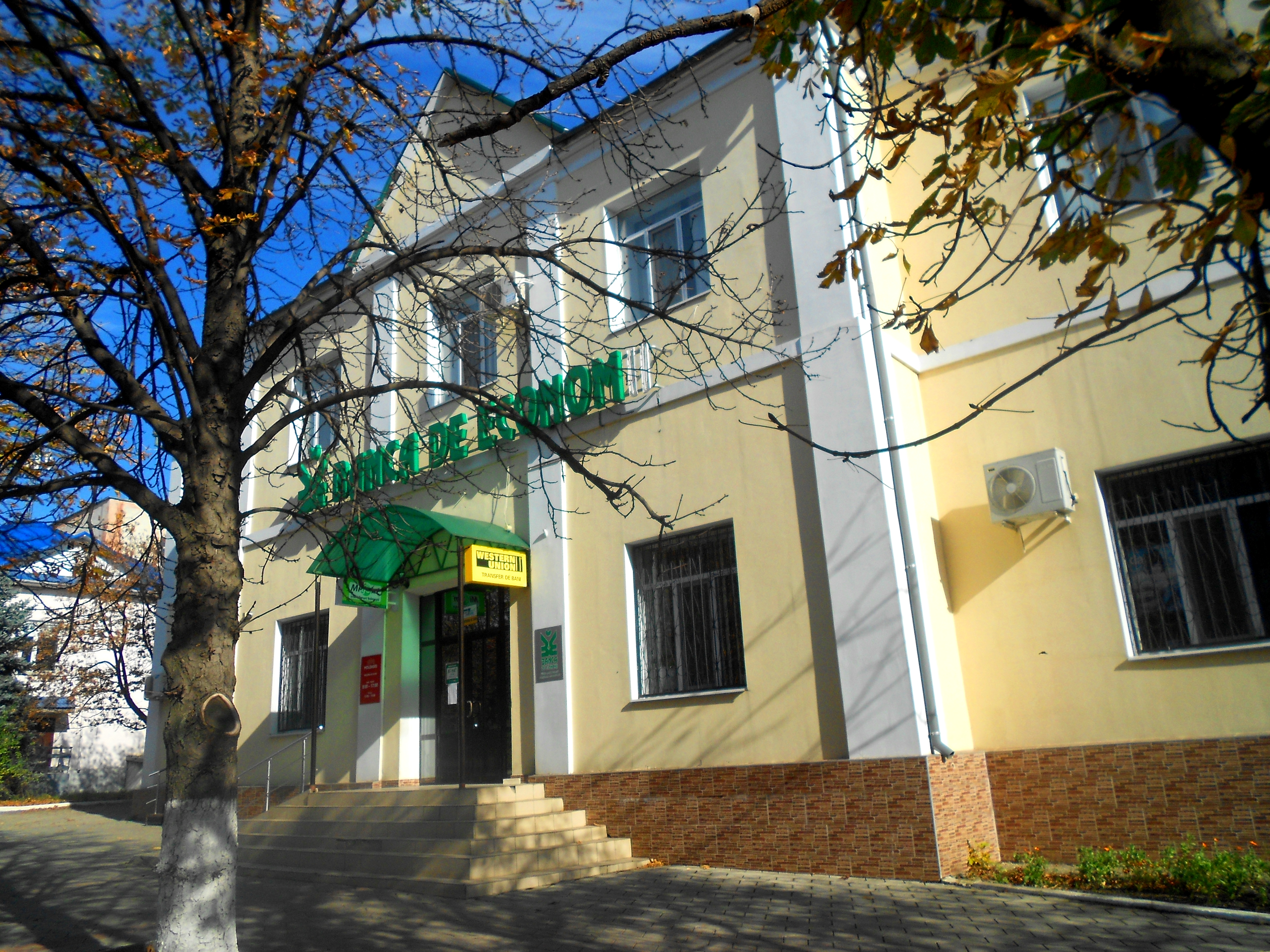 Banca de Economii din Fălești